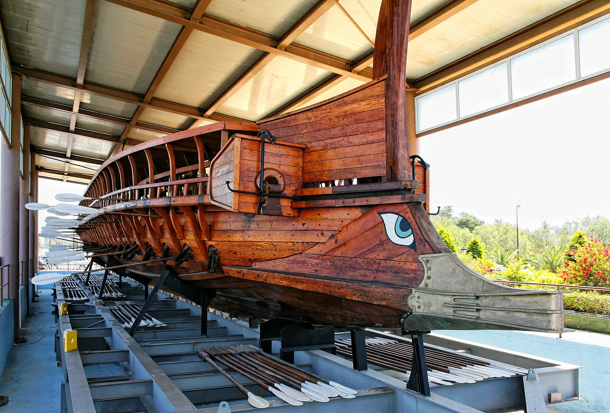 η τριήρης «Ολυμπιάς» εκτίθεται στον ειδικά διαμορφωμένο στεγασμένο χώρο στο Πάρκο Ναυτικής Παράδοσης, στο Τροκαντερό